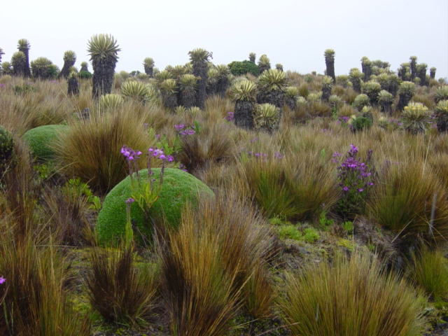 Nevado de Santa Isabel. Paramo. Colombia